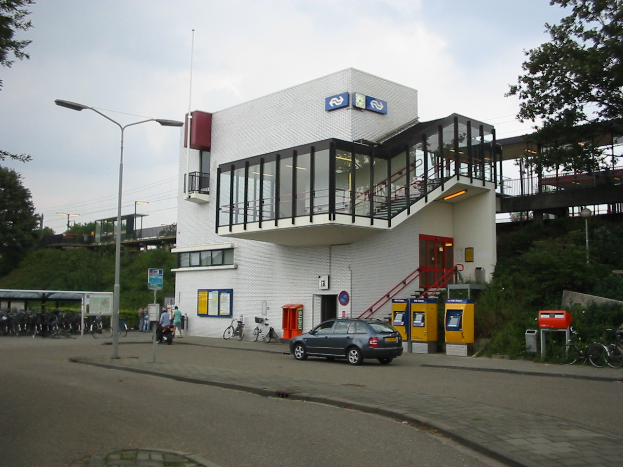 Stationsgebouw Zaltbommel